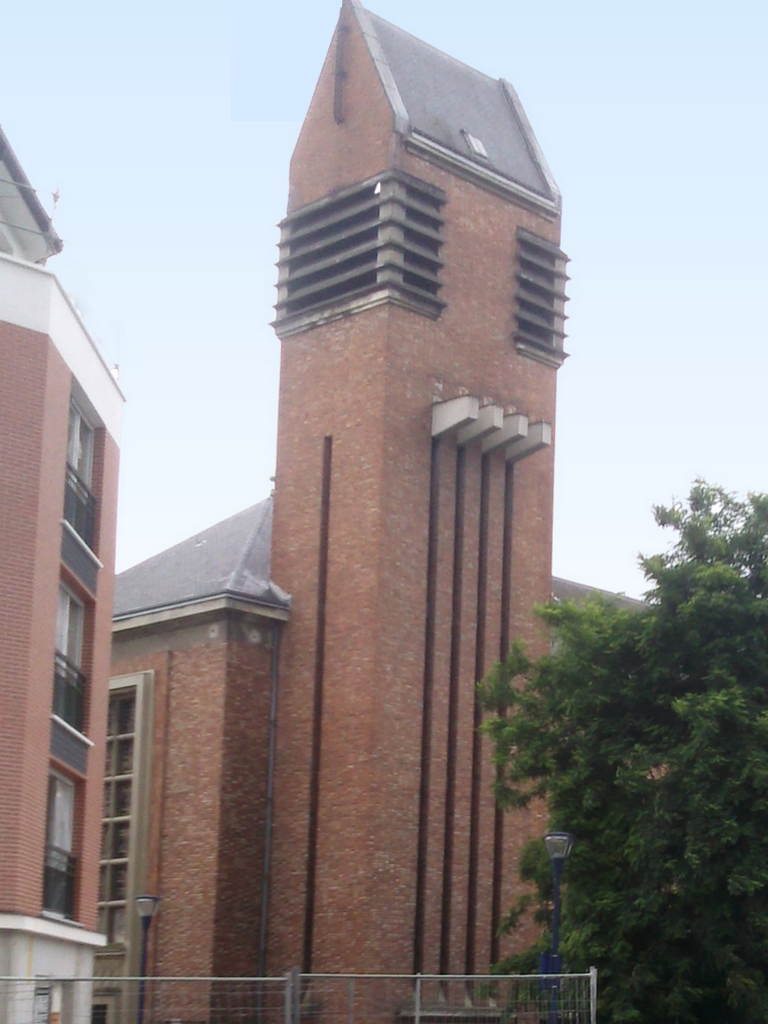 L'église Saint Jean l'Evangéliste à Drancy